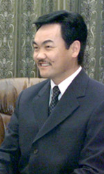 Natsagiyn Bagabandi